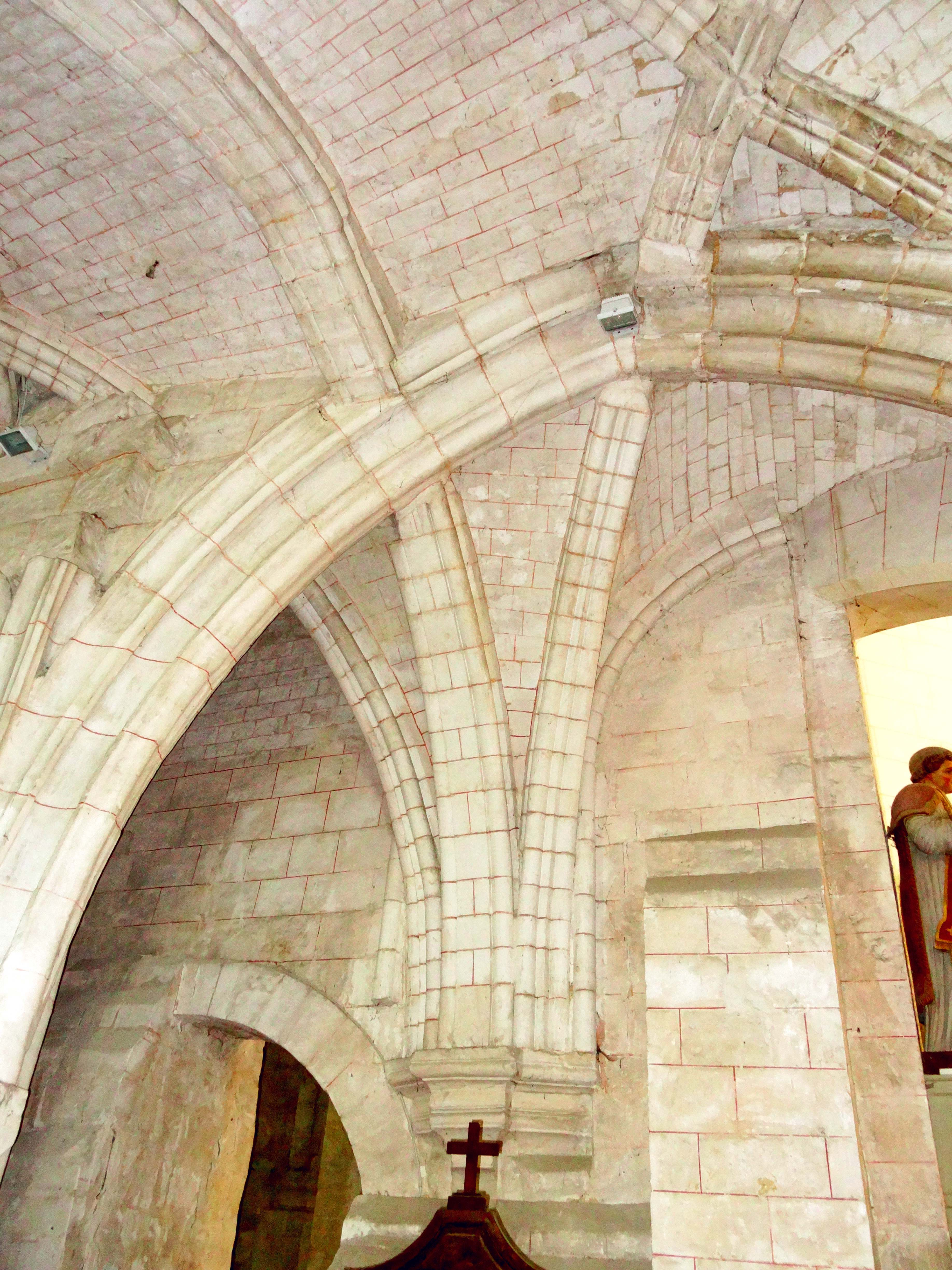 Voûte de l'église - voir titre.